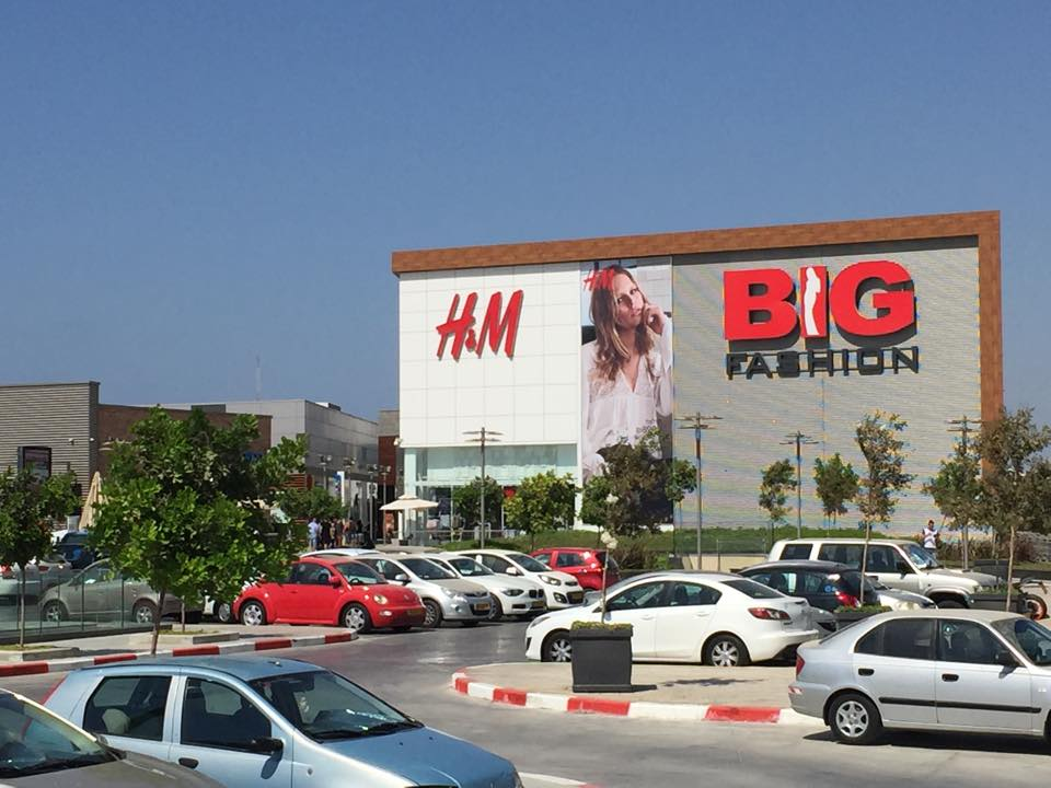 ביג פאשן אשדוד Big Fashion Ashdod 2015